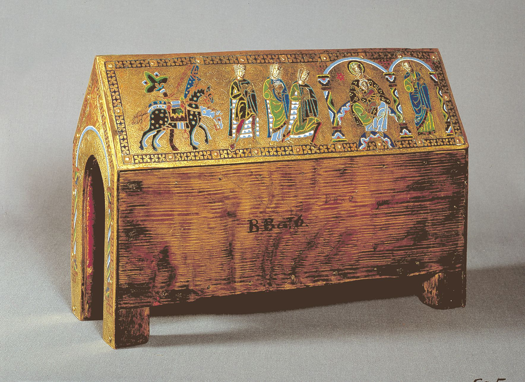 Skrinet er udført i Limoges i Frankrig. Det er af forgyldt kobber og grubeemalje på en trækerne. Lågets motiv er De Hellige tre Kongers tilbedelse af Jesusbarnet. Datering: o. 1180